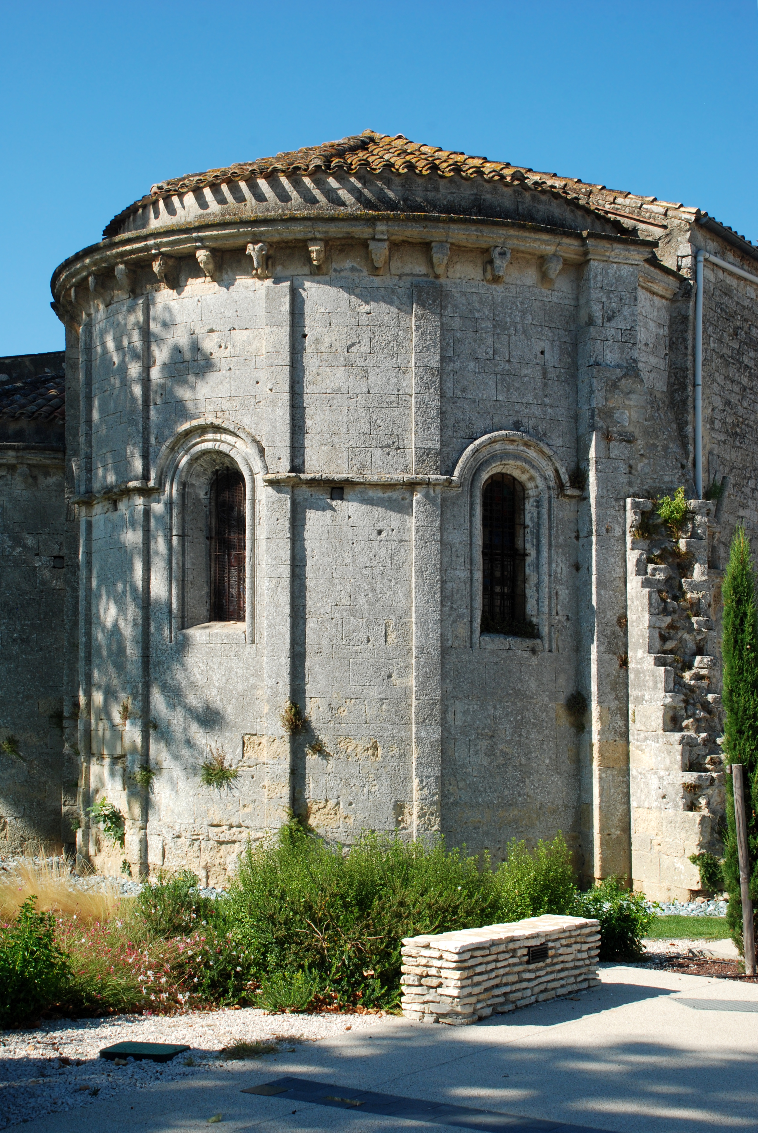 France - Languedoc - Hérault - Église Saint-Laurent de Lattes